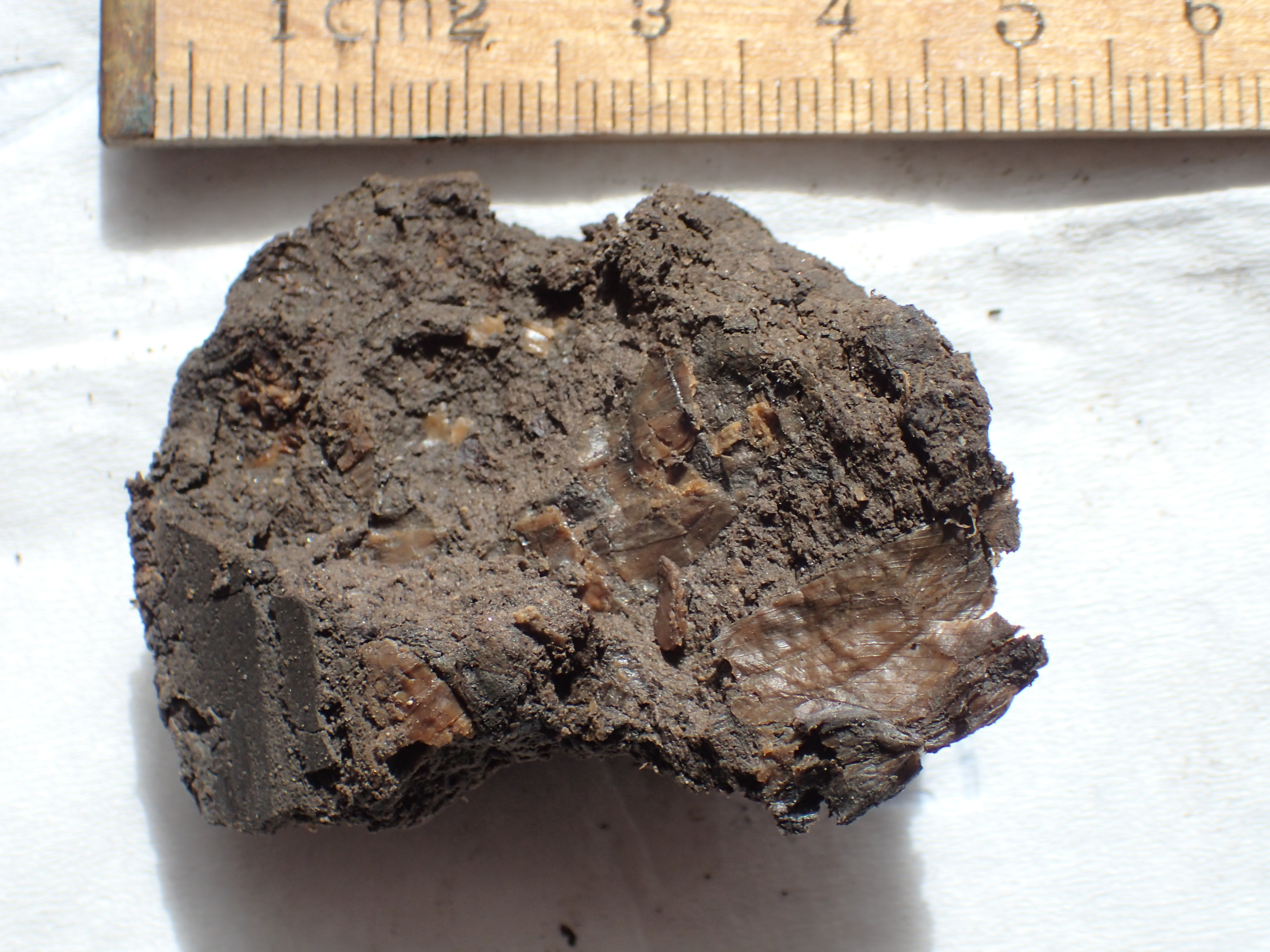 Gytje rig på plantedele, Masnedsund ved Vordingborg